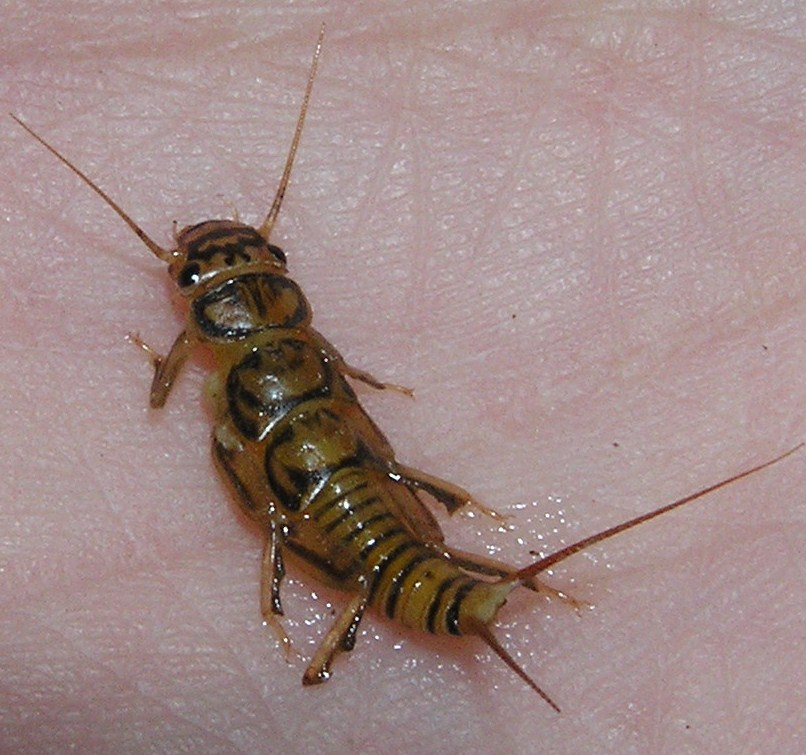 Agnetina flavescens, IN, 4/2006.